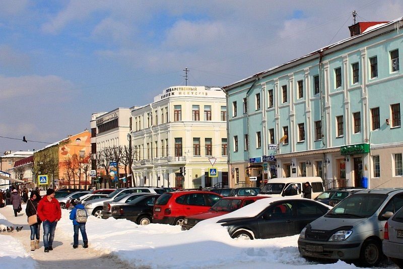 Магілёў пасля Хаўера